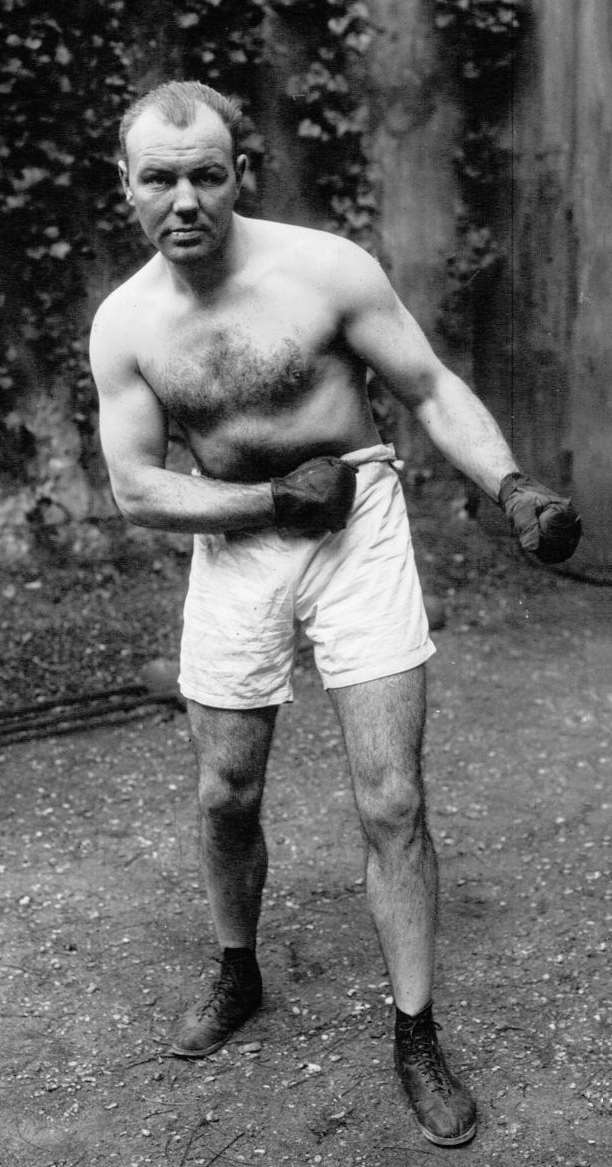 Mac Goorty, boxeur, en garde, de face : [photographie de presse] / Agence Meurisse